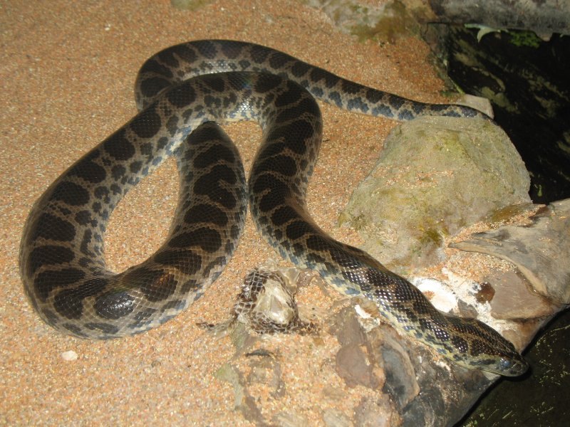 Yellow Anaconda, Eunectes notaeus